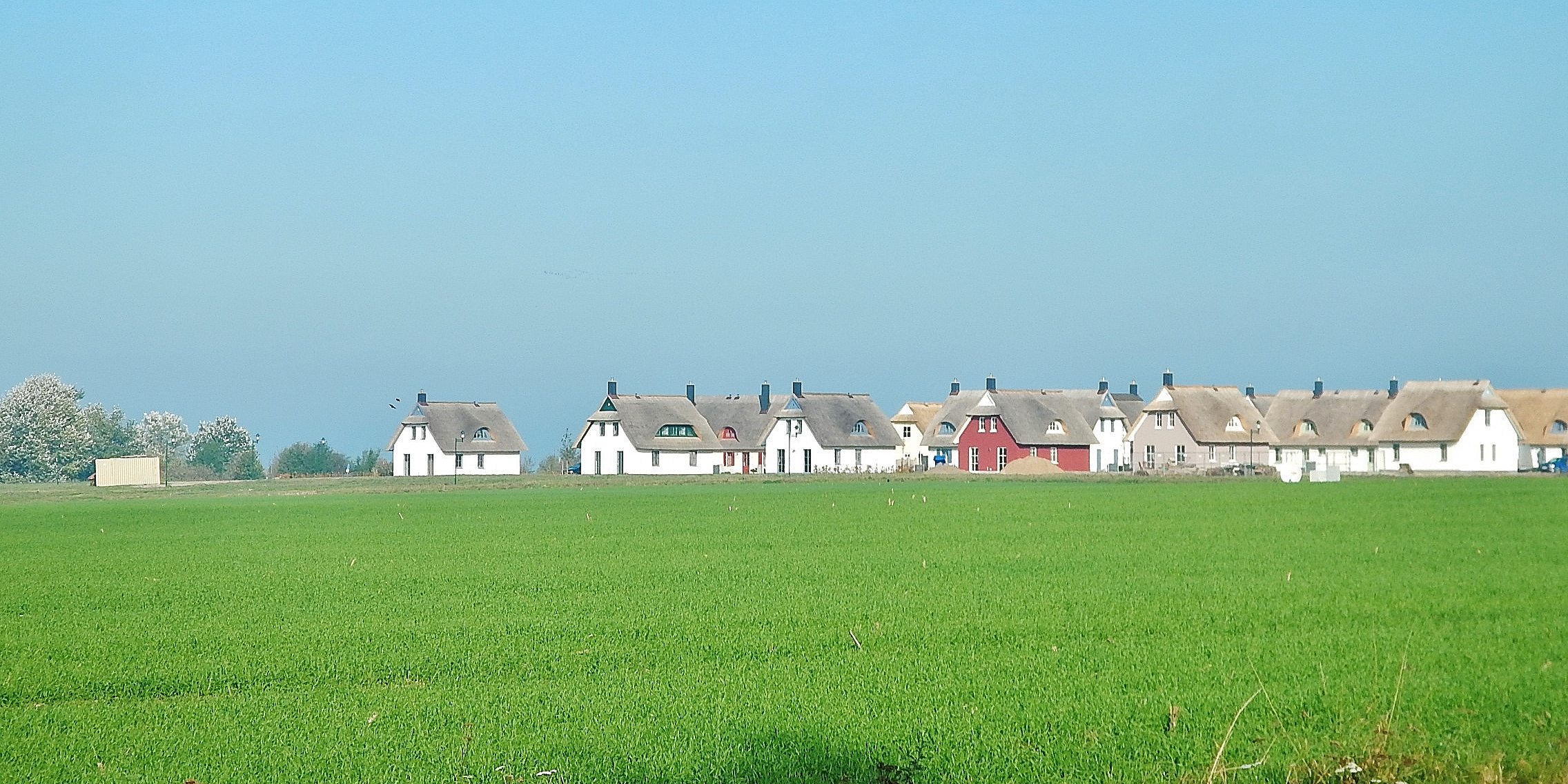 De Poeler Drift: Ferienhäuser an der Wismarbucht